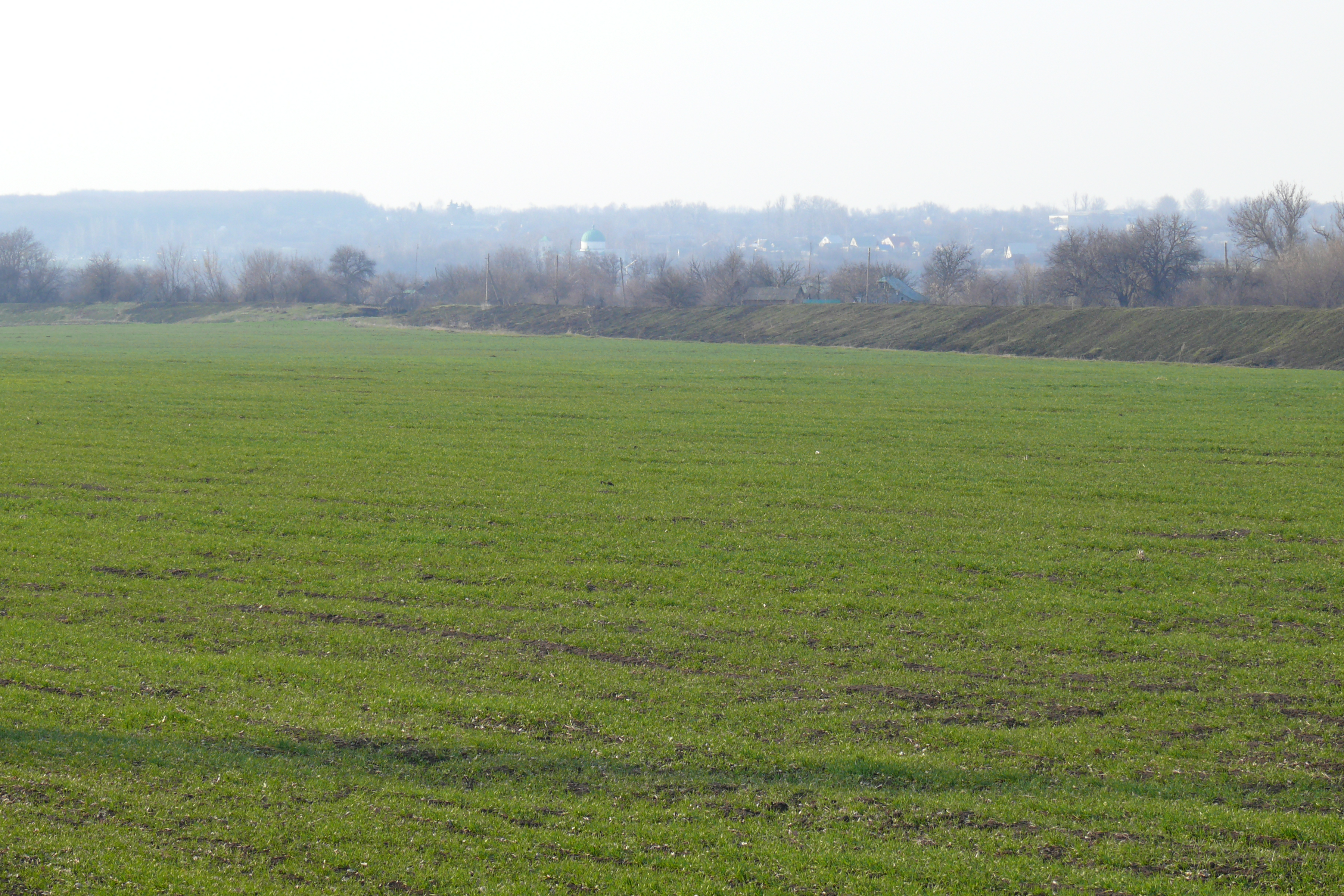 Высокополье. Уцелевший Перекопский вал